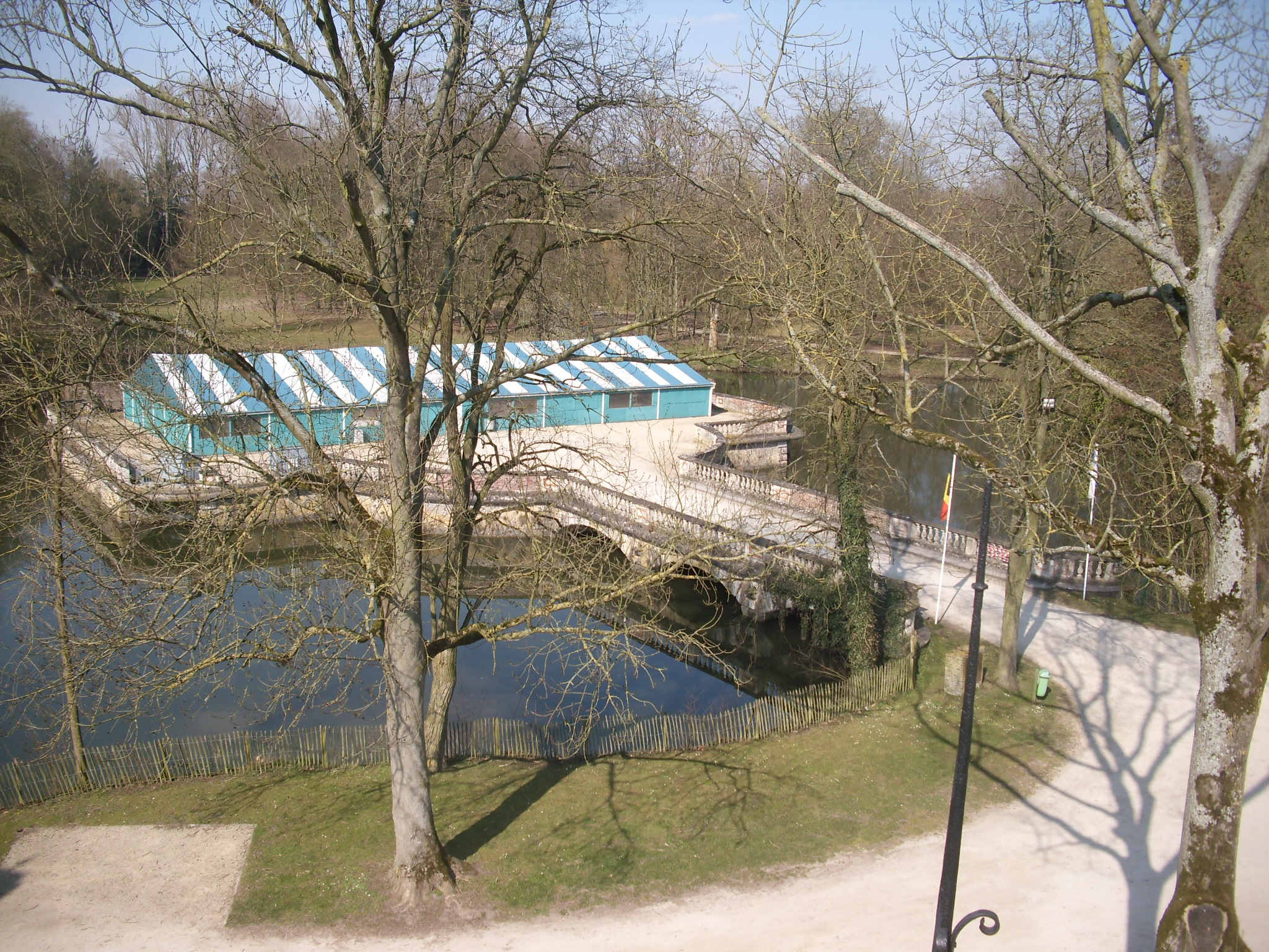 Locatie van het in 1973 afgebrande kasteel - gezien van op het dak van de bibliotheek - Kortrijkstraat - Elsegem - Wortegem-Petegem - Oost-Vlaanderen - België